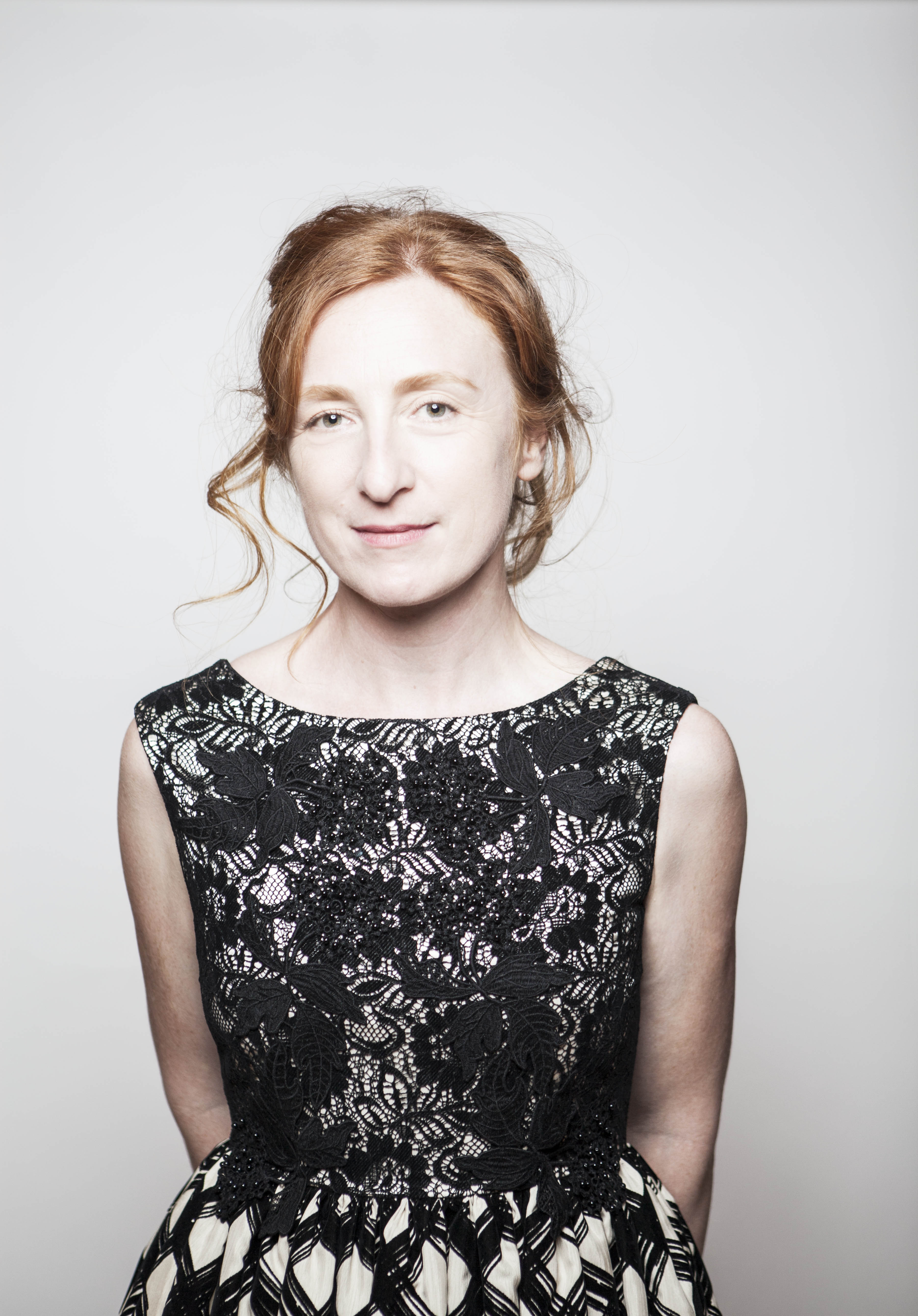 Ritratto